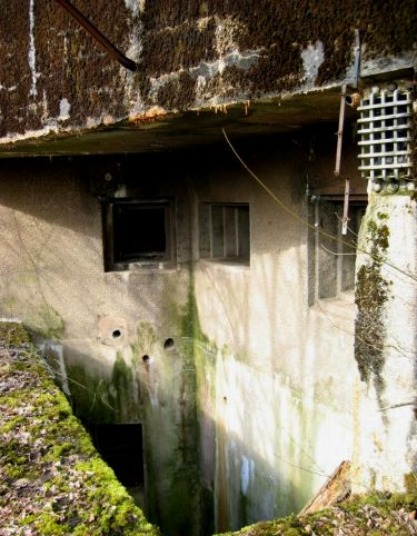 Maginot Line - Gros Ouvrage Kobenbusch - Bloc 2